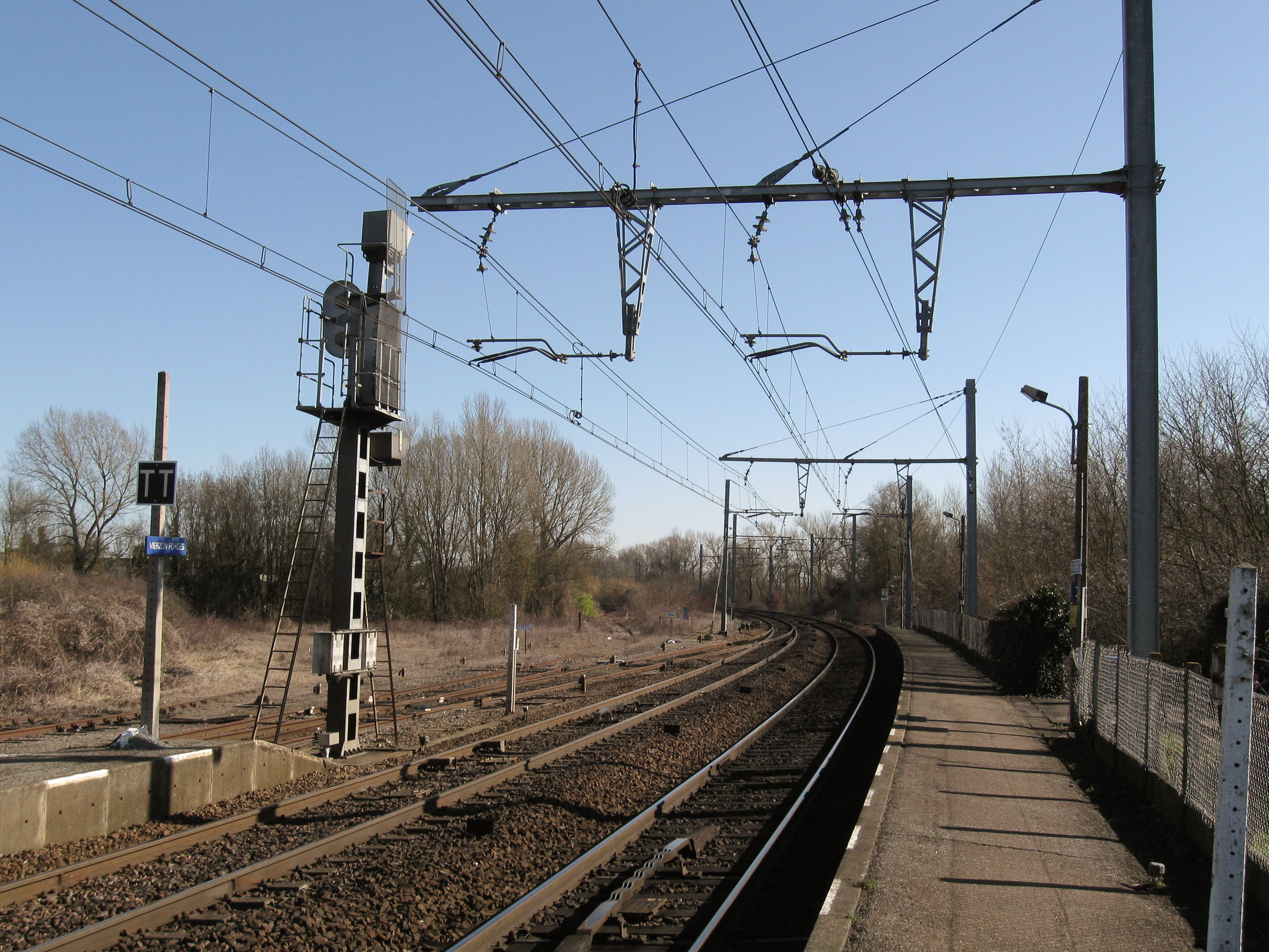 Gare de Vierzon-Forges, Vierzon, Cher, France